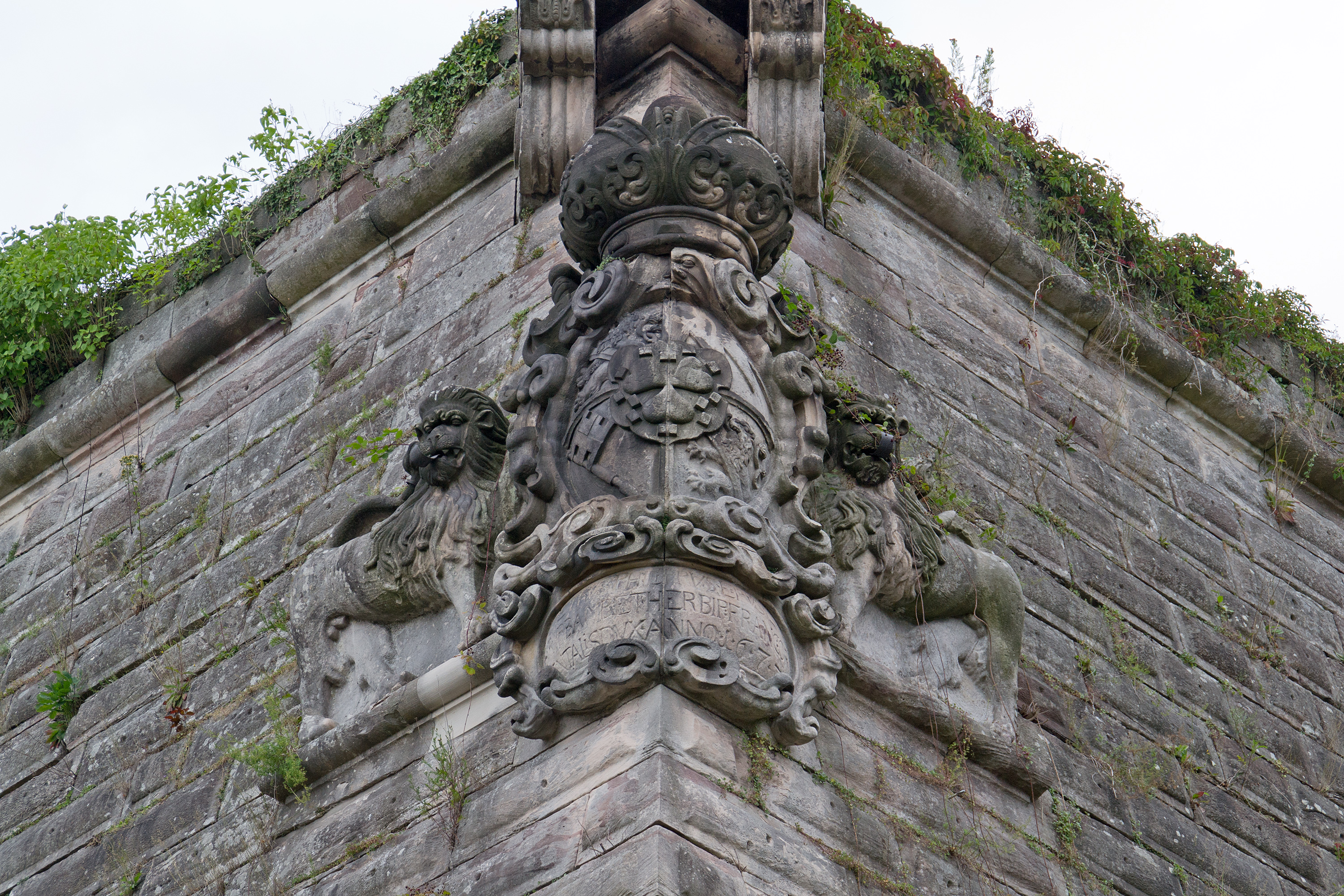 Wappen des Bamberger Fürstbischofs Peter Philipp von Dernbach an der Spitze der Bastion St. Heinrich der Festung Rosenberg in Kronach.